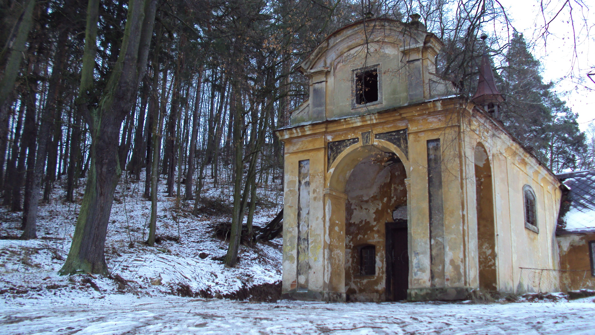 Zpustlá kaple sv.Josefa na úpatí Kamenického kopce nad Zákupy